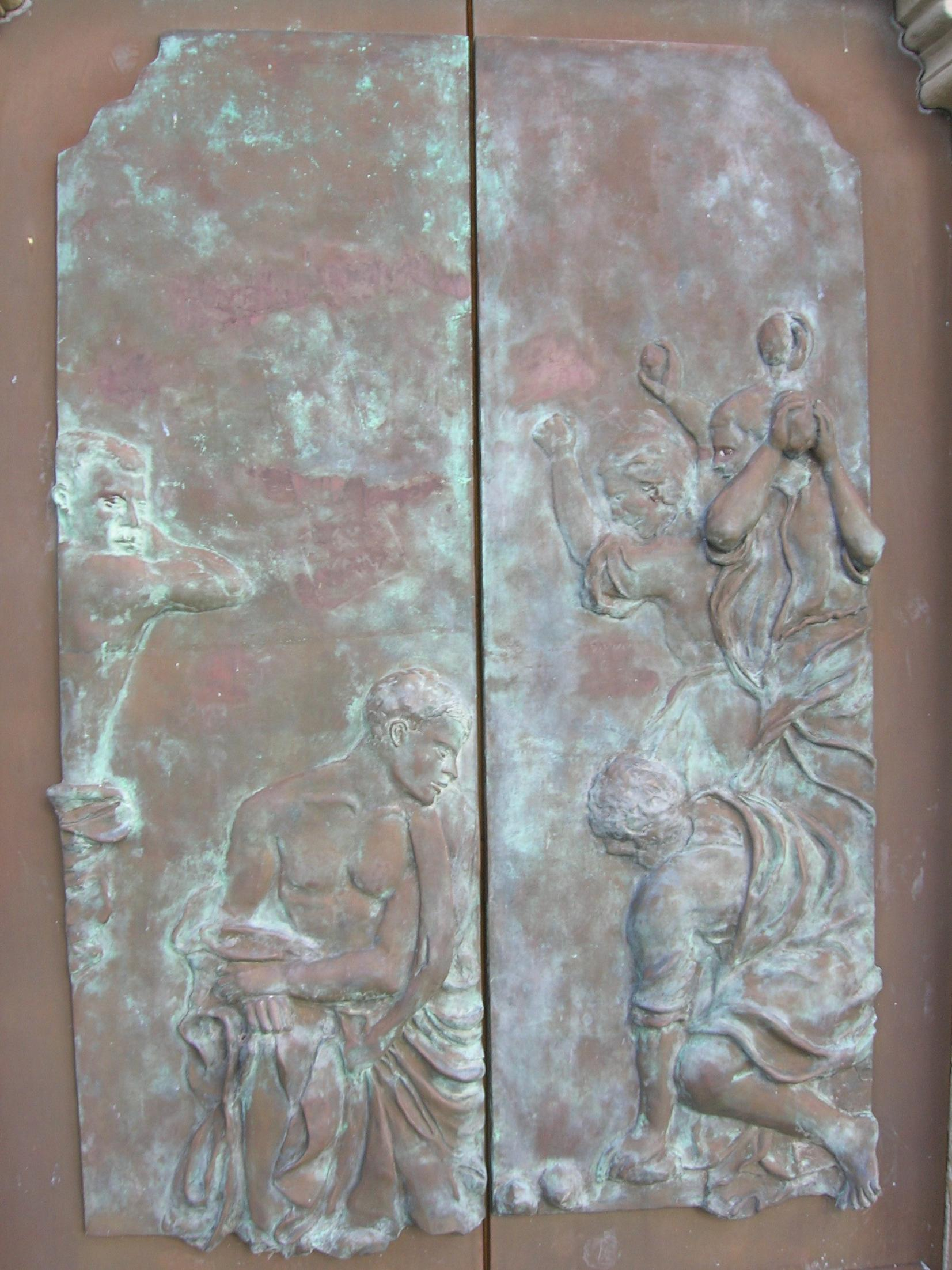 La Spezia chiesa di Marinasco (particolar del portale)